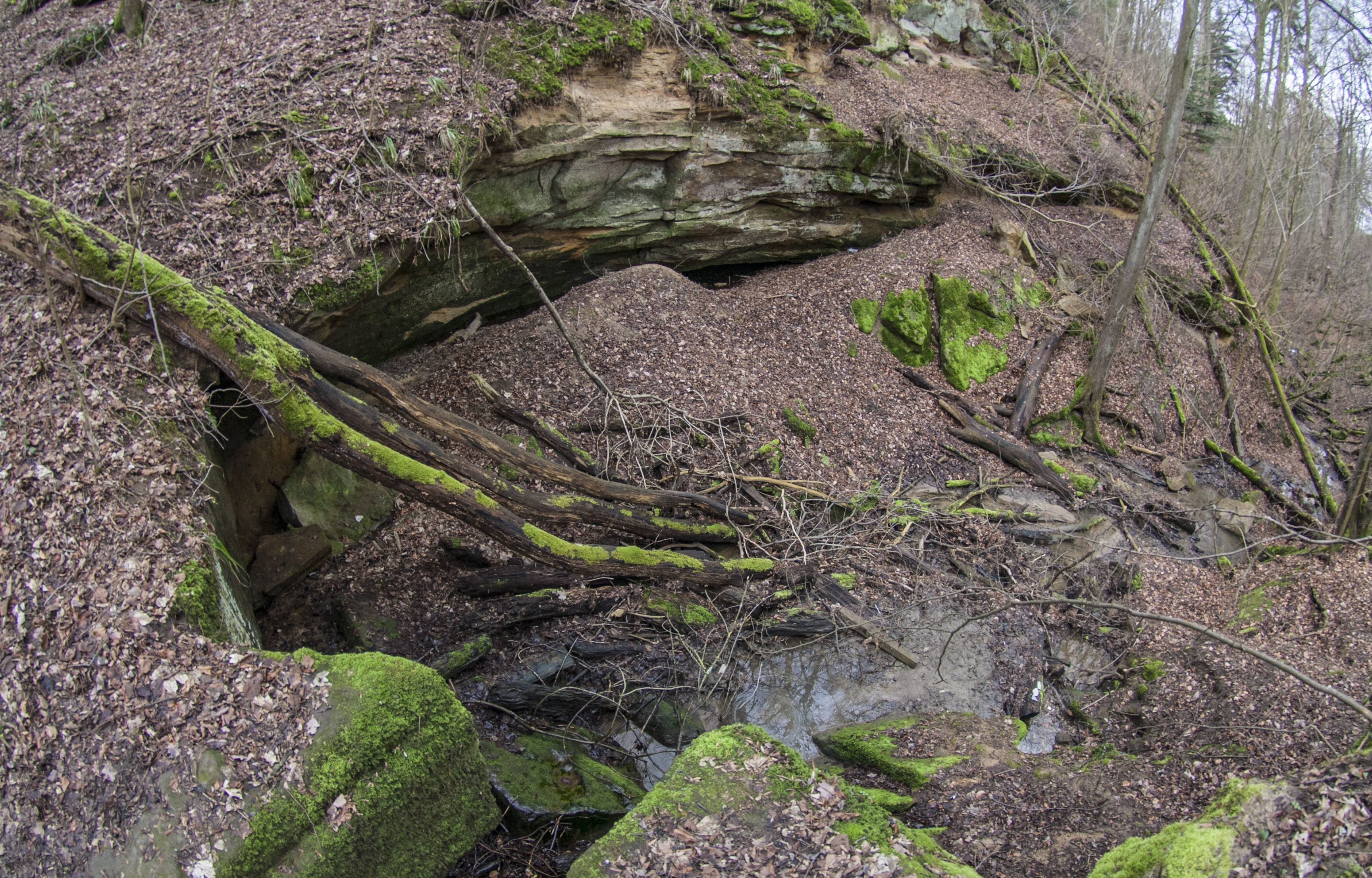 Teufelsbadstube, Kalchreuth